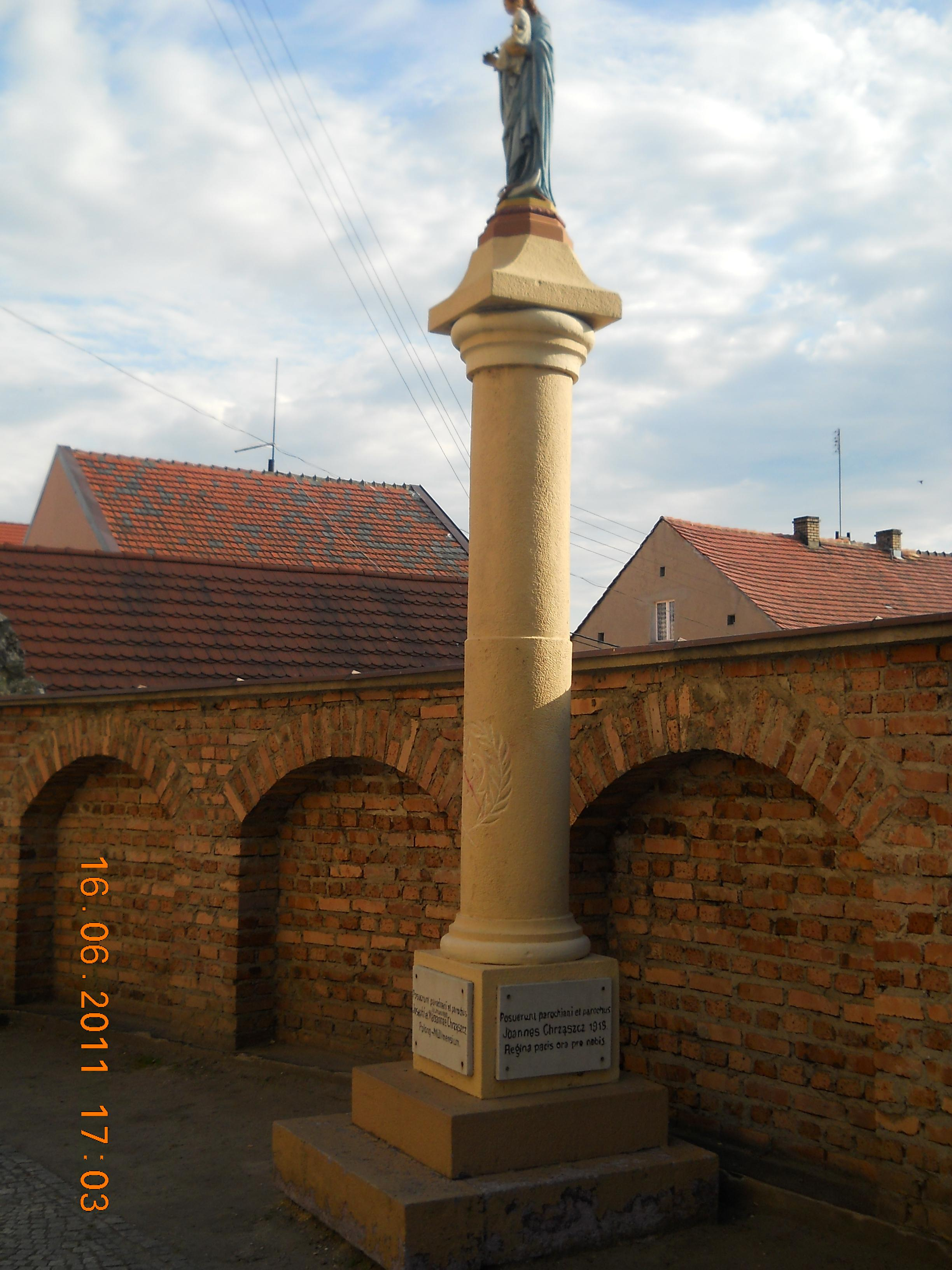 kościół par. p.w. św. Mikołaja - kolumna maryjna przed głównym wejściem - Pyskowice, ul. Poniatowskiego